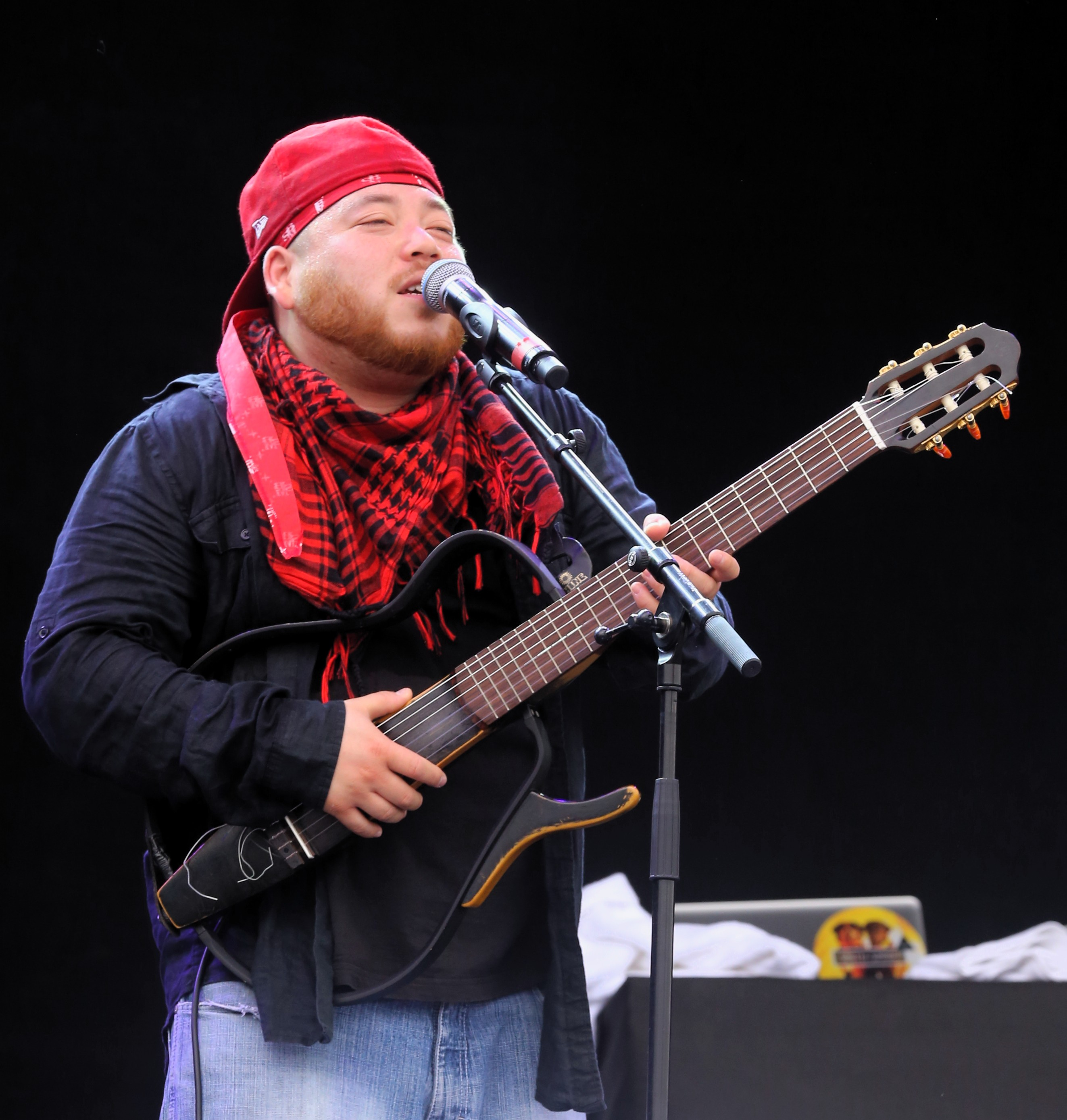 Martin Jondo auf dem Chiemsee Reggae Summer Festival 2013 Festivalsommer This photo was created with the support of donations to Wikimedia Österreich and Wikimedia Deutschland in the context of the CPB project "Festival Summer".